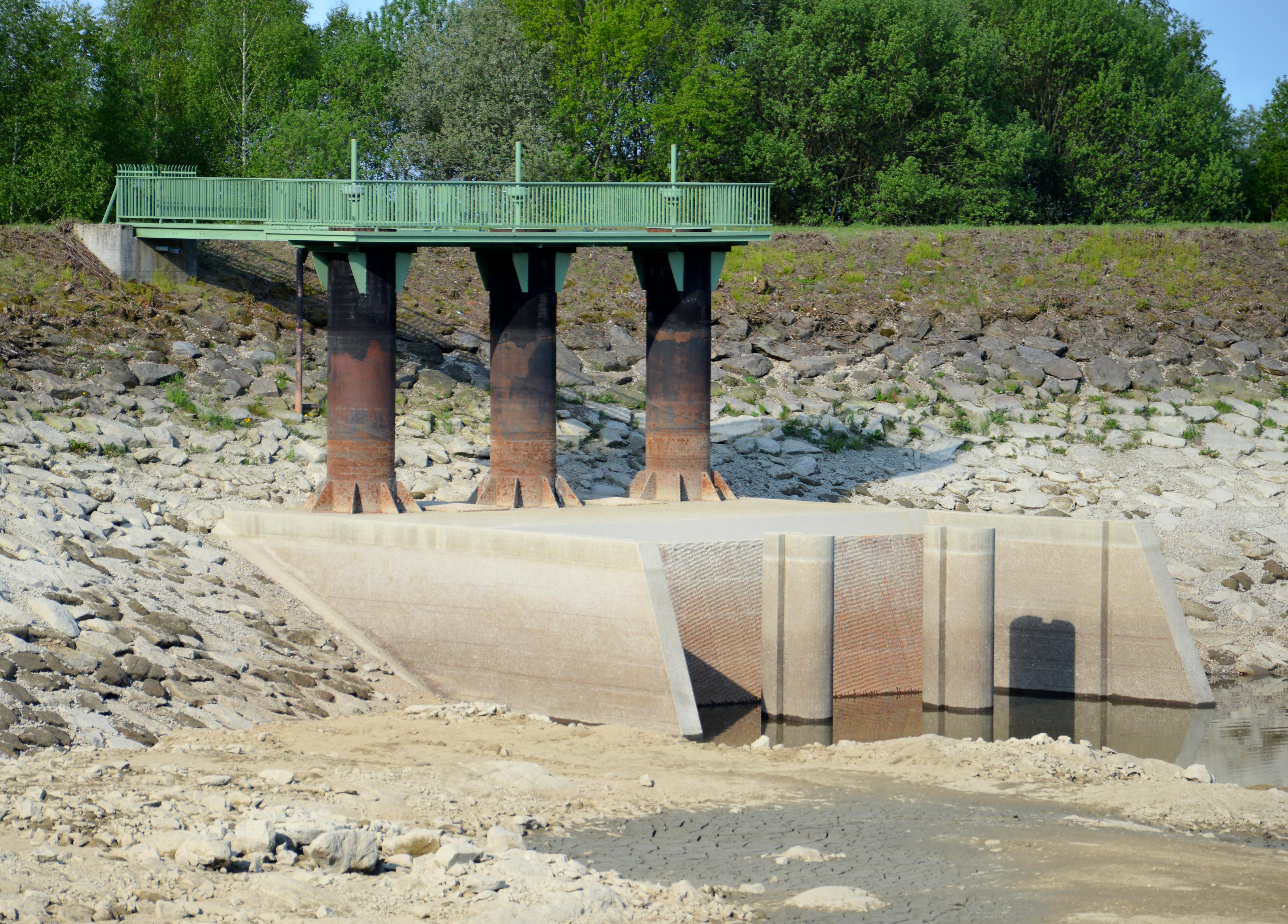 Einlaufbauwerk des Pumpspeichersees Oberberg